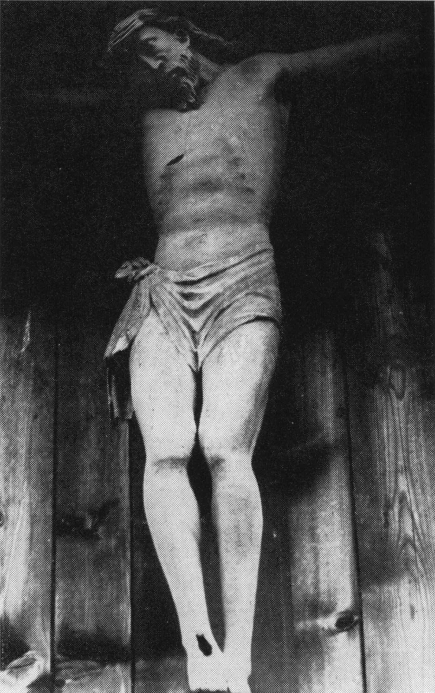 Kruzifix (made by Georg Hauser, † 1653)